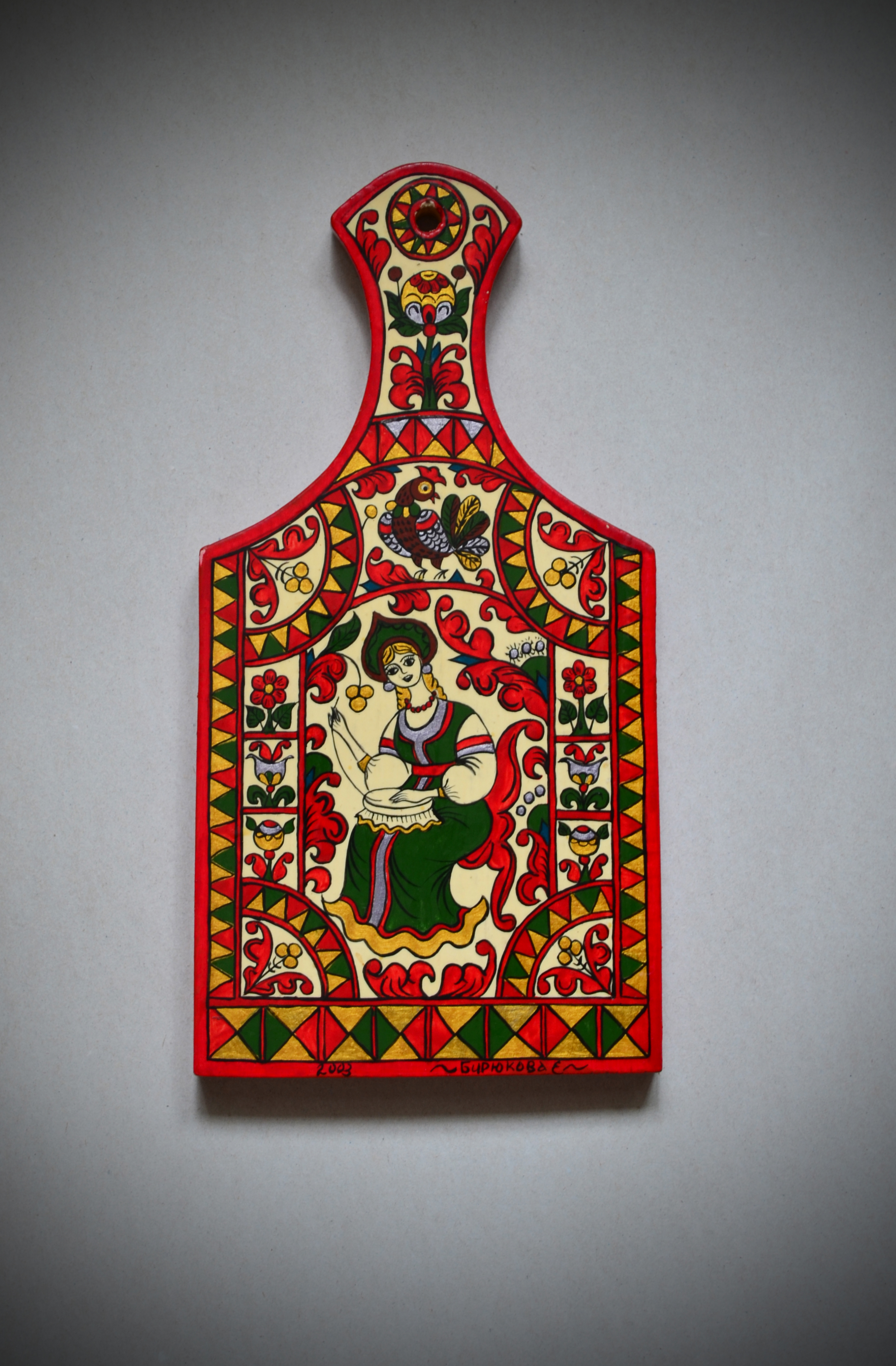 Пермогорская роспись по дереву.Россия,Архангельская область.